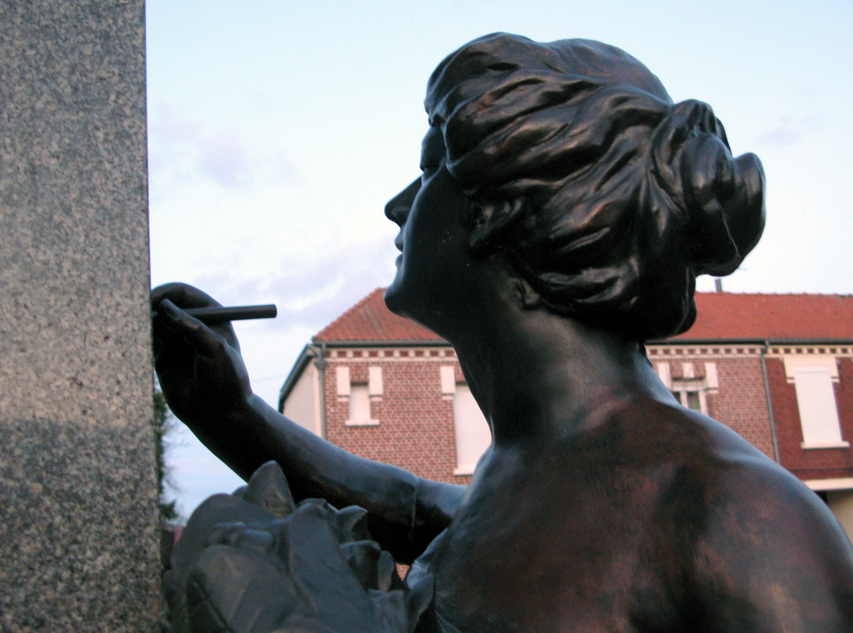 Roisel (Somme, France) - Le monument-aux-morts, qui se dresse derrière l'église, représente une femme debout qui écrit. .